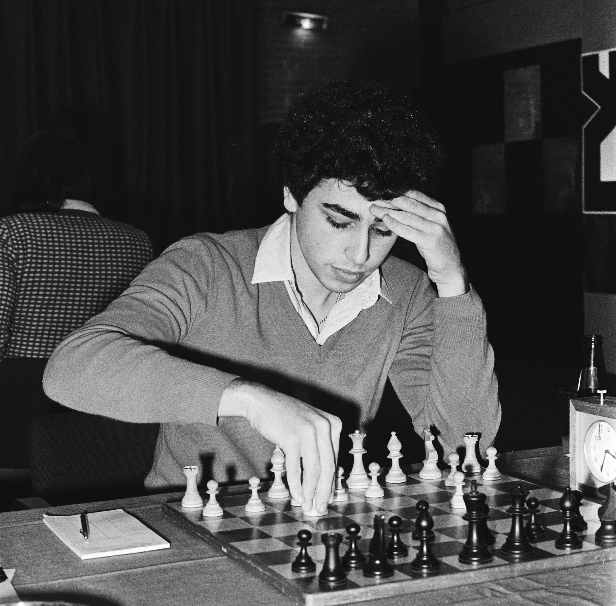 Hoogovenschaaktoernooi 1980; Seirawan in aktie.